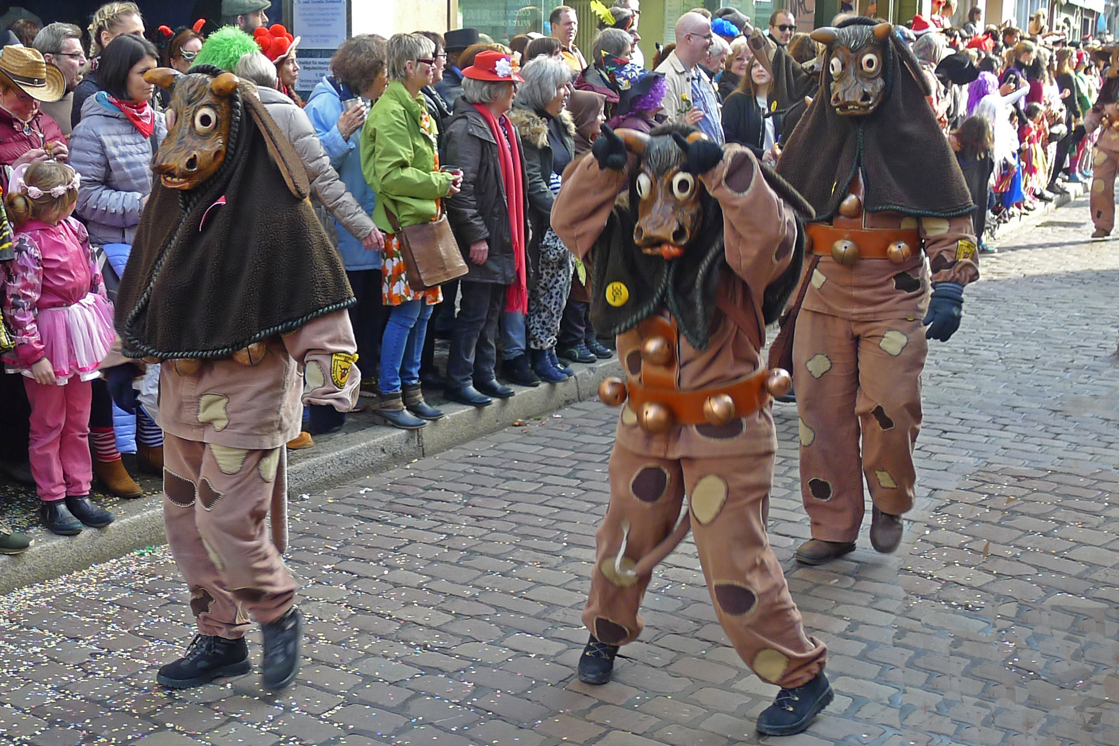 Moorochsen der Narrenzunft Moorochs e.V. beim Rosenmontagsumzug am 27.02.2017 in Freiburg